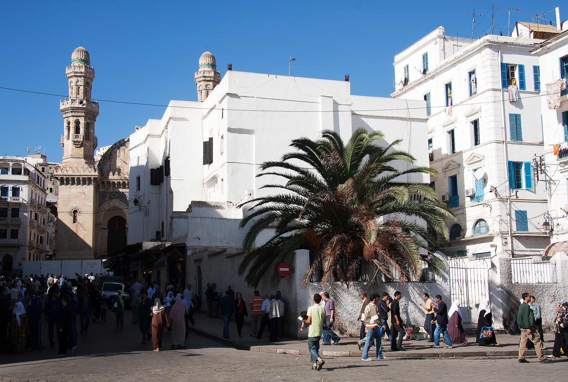 L'un des palais d'Alger